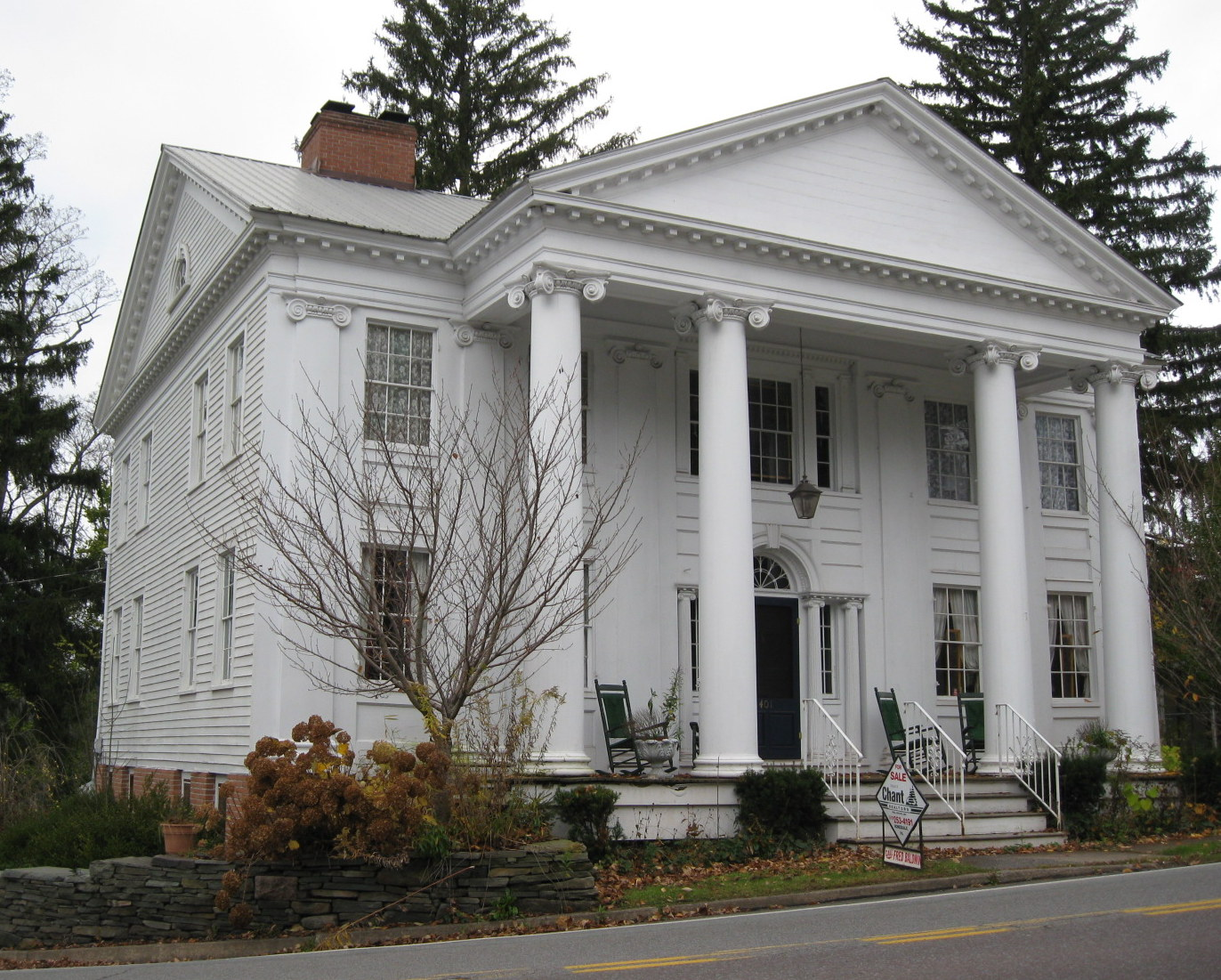 Bethany, Pennsylvania